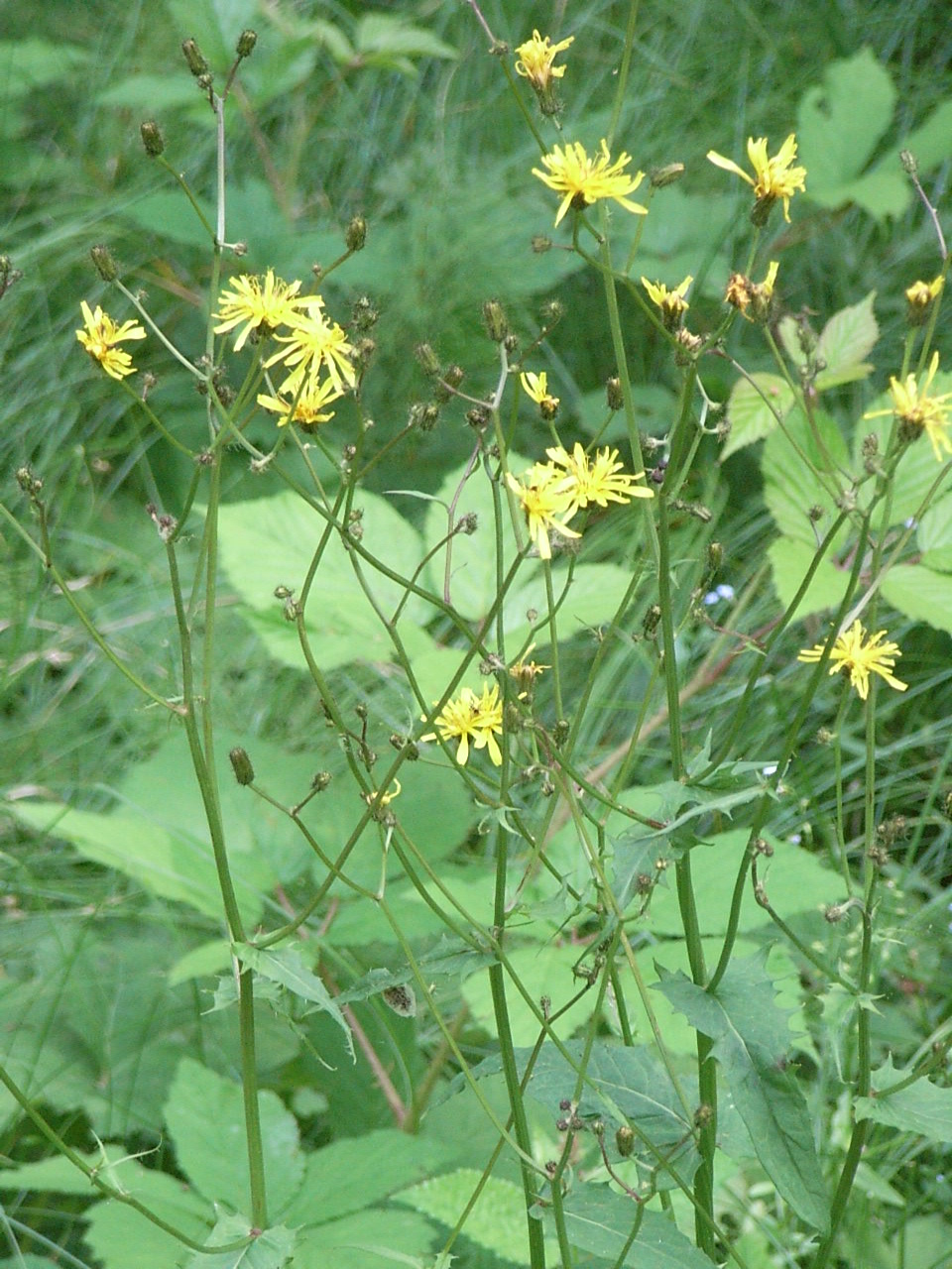 Sumpf-Pippau bei Spiegelhütte, Landkreis Regen, Bayerischer Wald